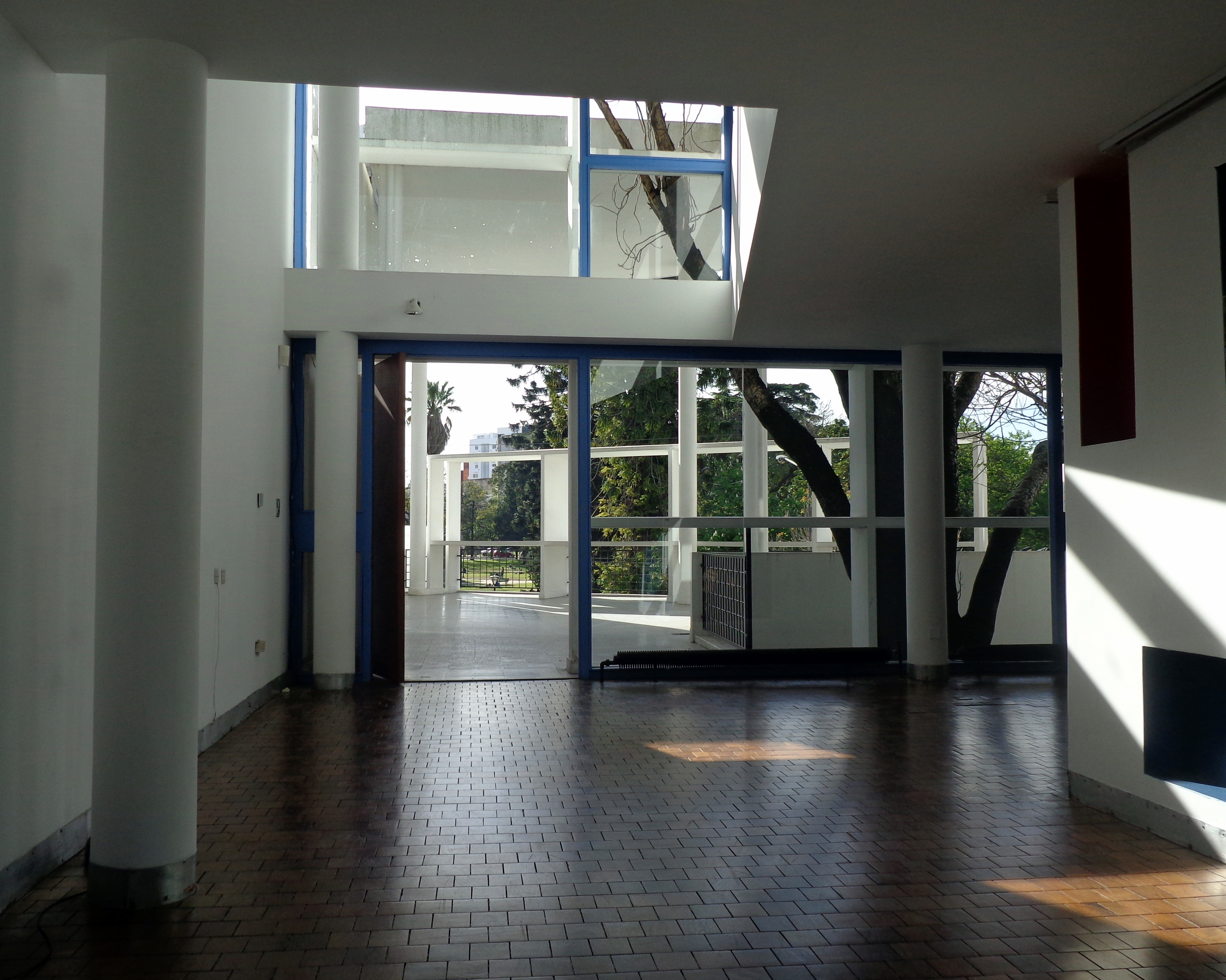 Casa Curutchet, diseñada por el arquitecto suizo Le Corbusier y construida en la ciudad de La Plata, capital de la Provincia de Buenos Aires, en Argentina, entre los años 1949 y 1953. En Avenida 53 Nº 320, entre 1 y 2. En 2016, fue declarada Patrimonio de la Humanidad por la Unesco.